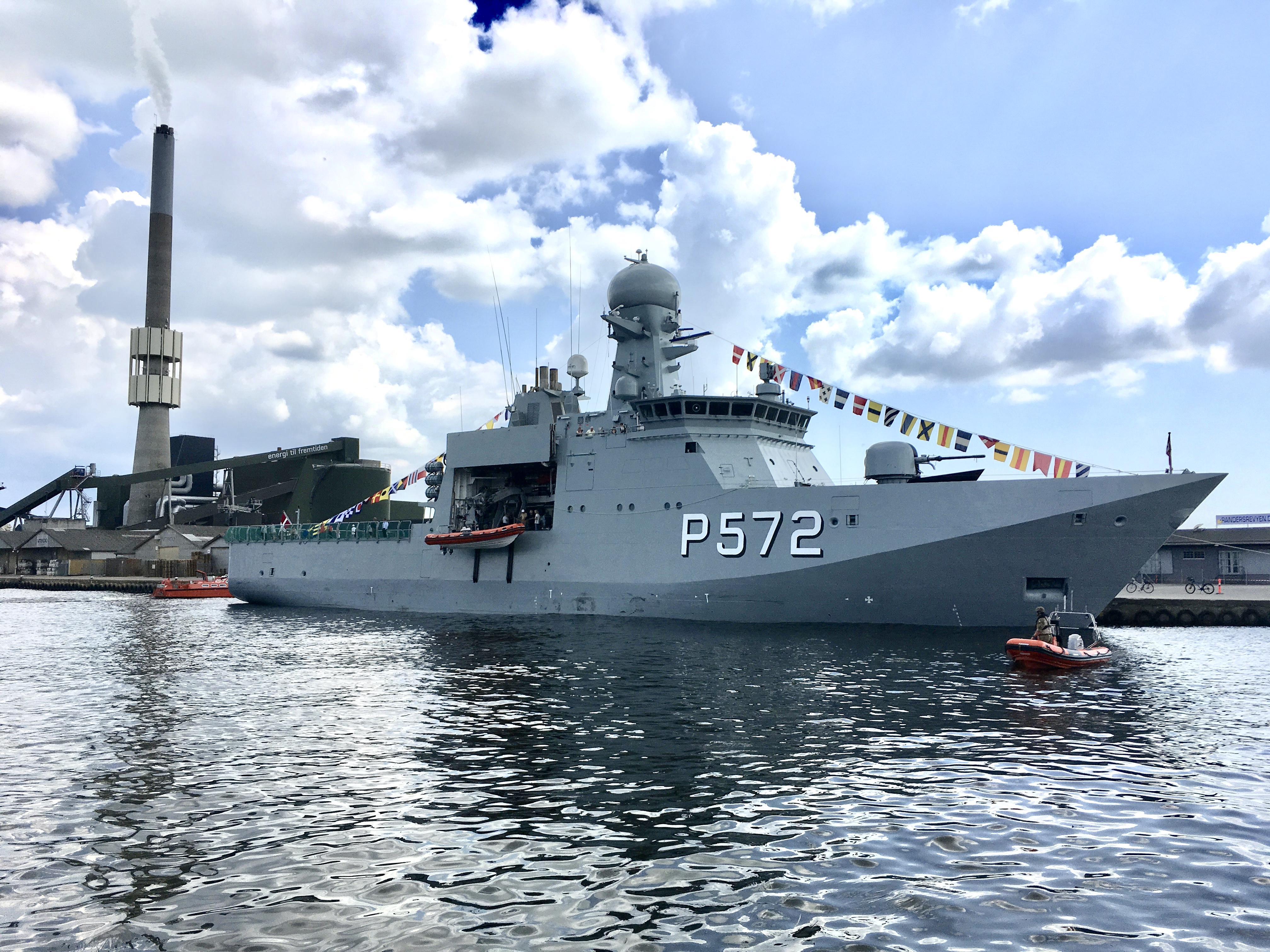 Lauge Koch i Randers Havn.